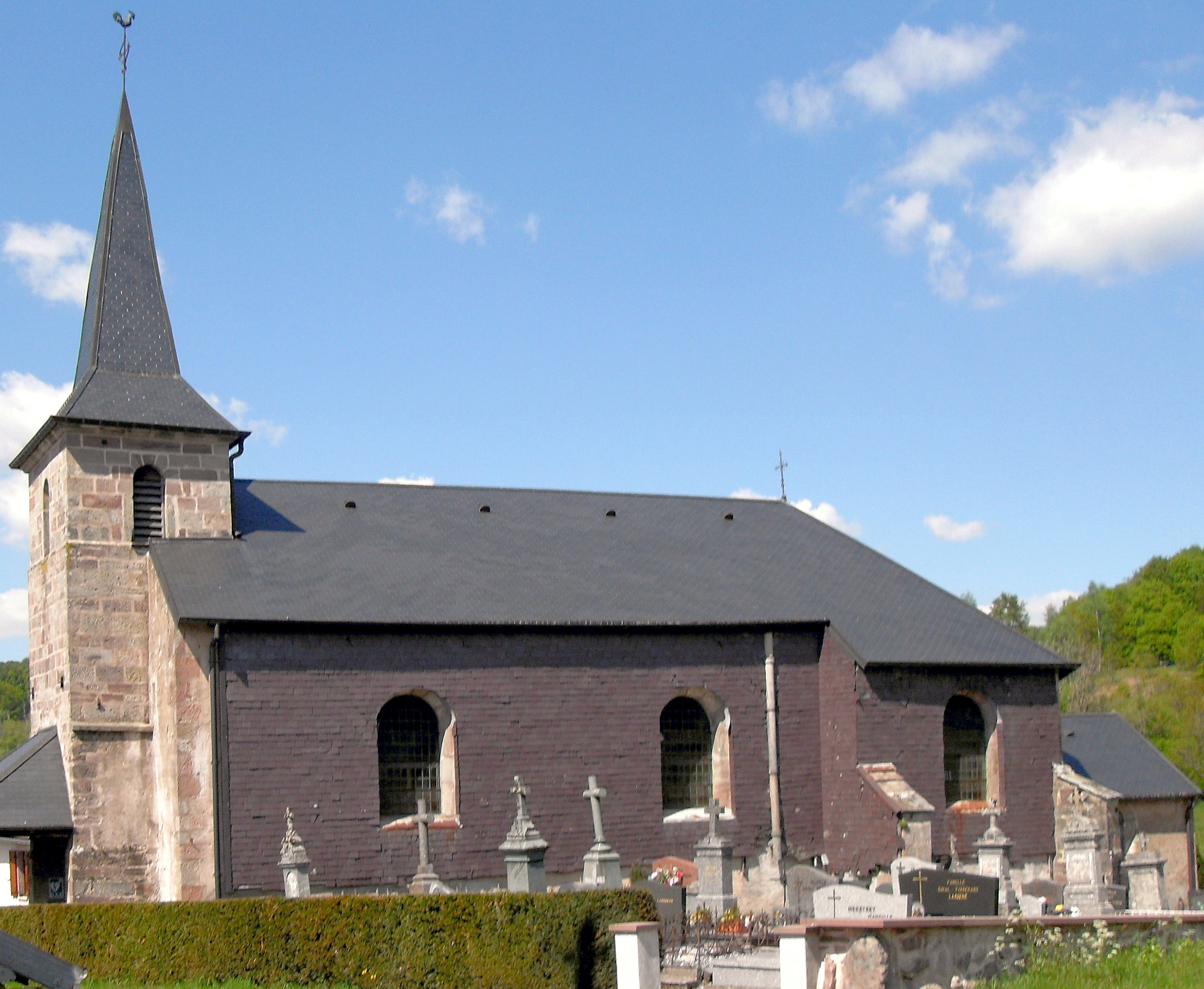 L'église Saint-Laurent à Beulotte-Saint-Laurent